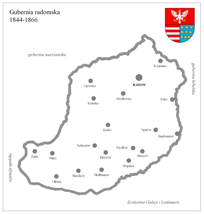 Dystrykt radomski 1939-1945